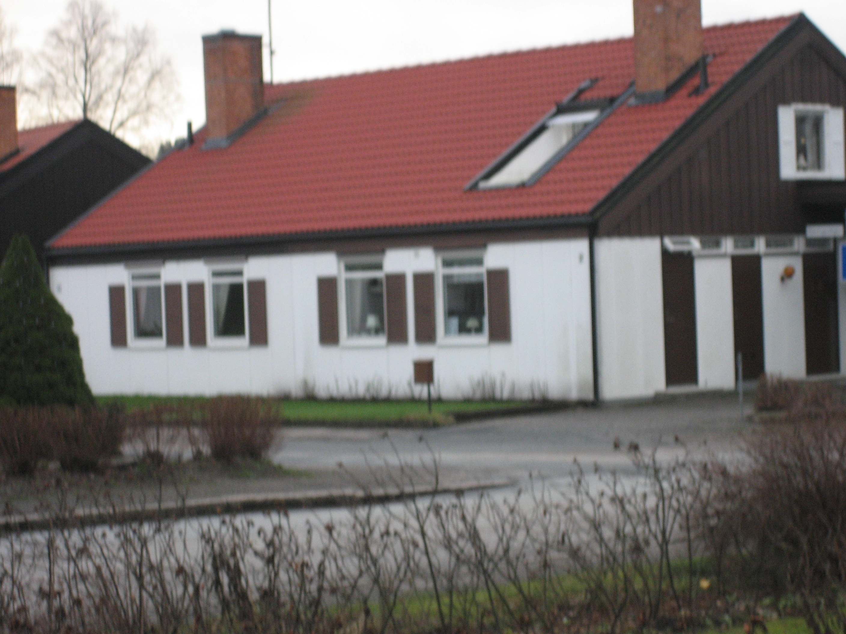 Negerbyn in Adolfsberg, Sweden